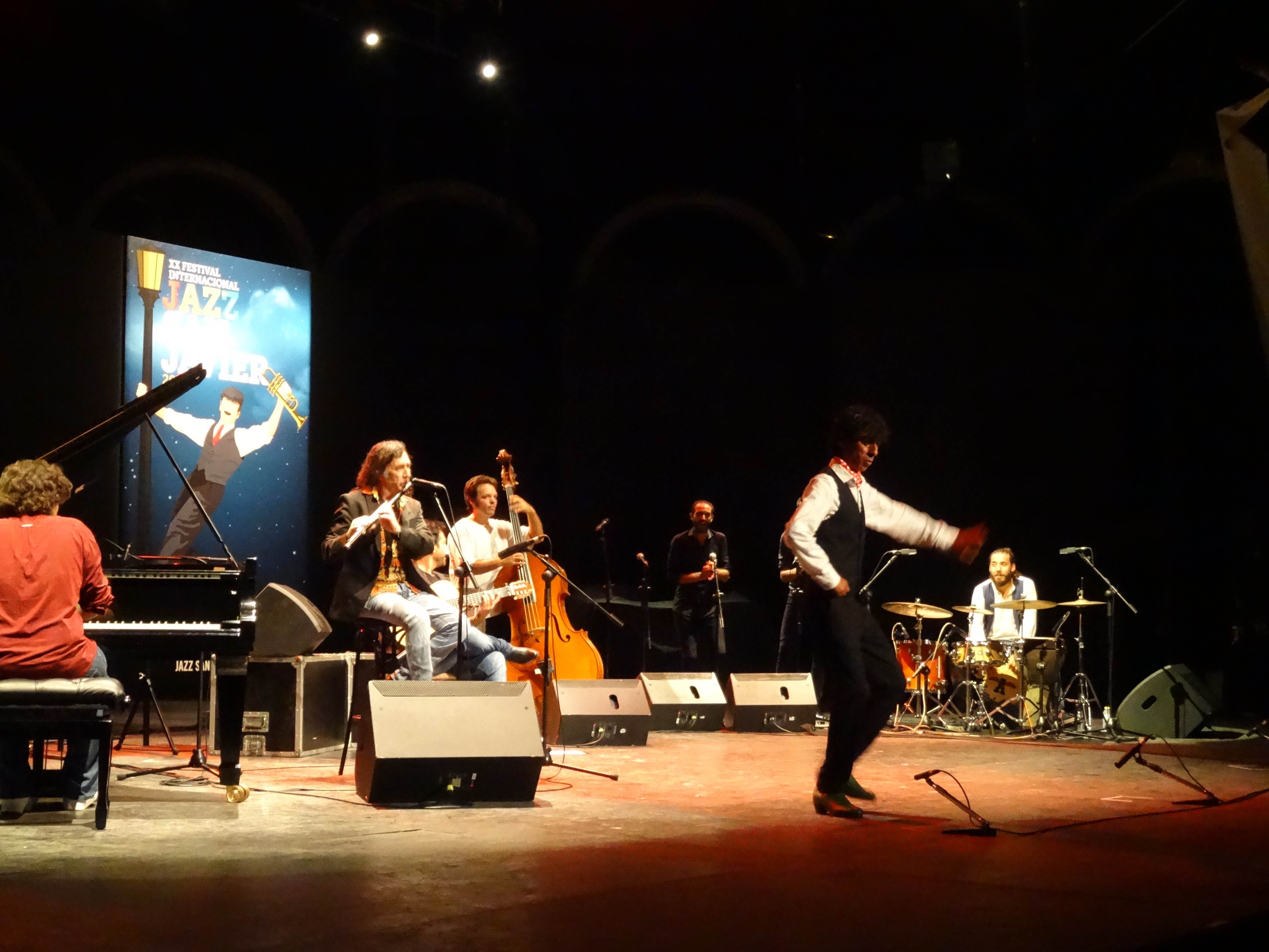 Concierto especial de Jorge Pardo para el XX aniversario del Festival de Jazz de San Javier. FORMACIÓN: Jorge Pardo (saxos y flautas) Niño Josele (guitarra flamenca) Tomasito (bailaor, compás y voz) Albert Sanz (piano) Pablo Báez (contrabajo) Ané Carrasco (percusión) Juan Grande (compás)